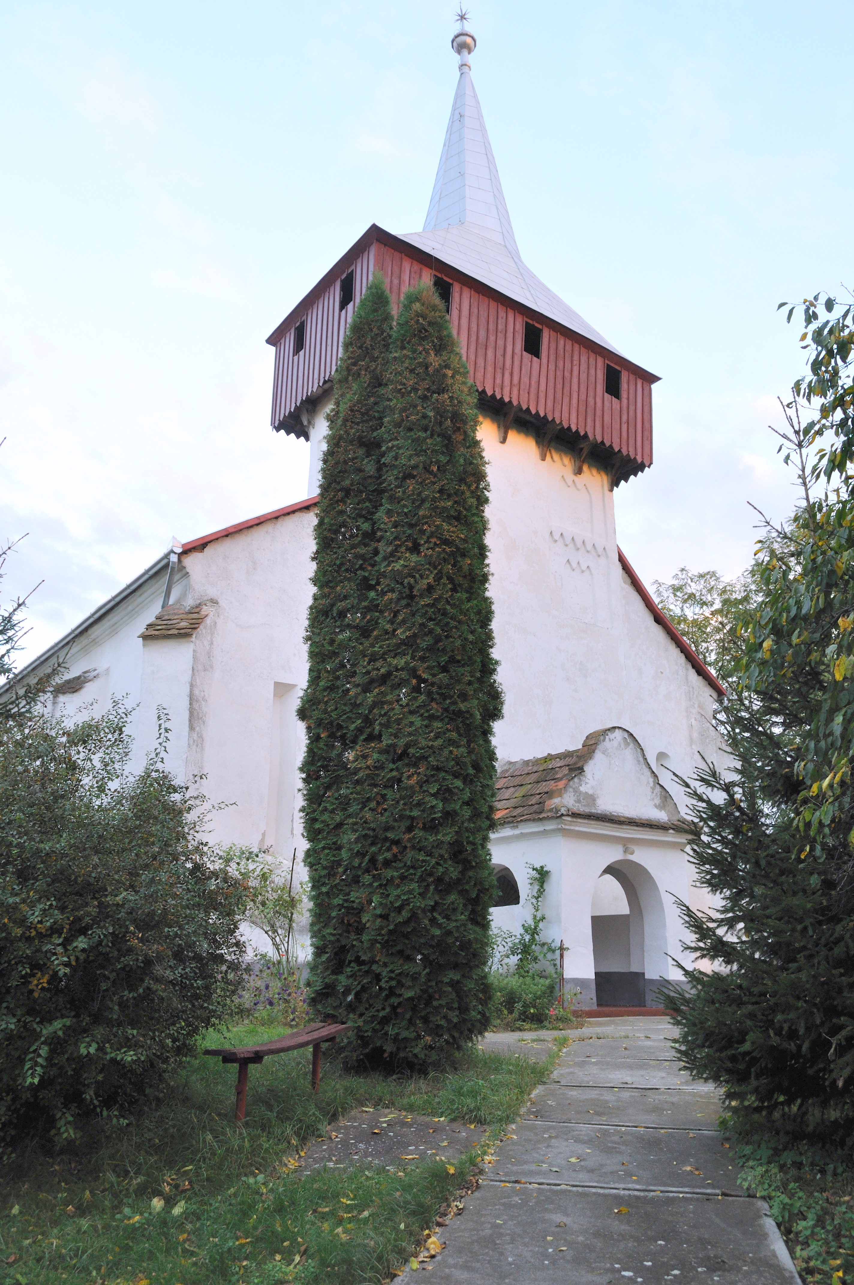 Biserica reformată din Cetatea de Baltă